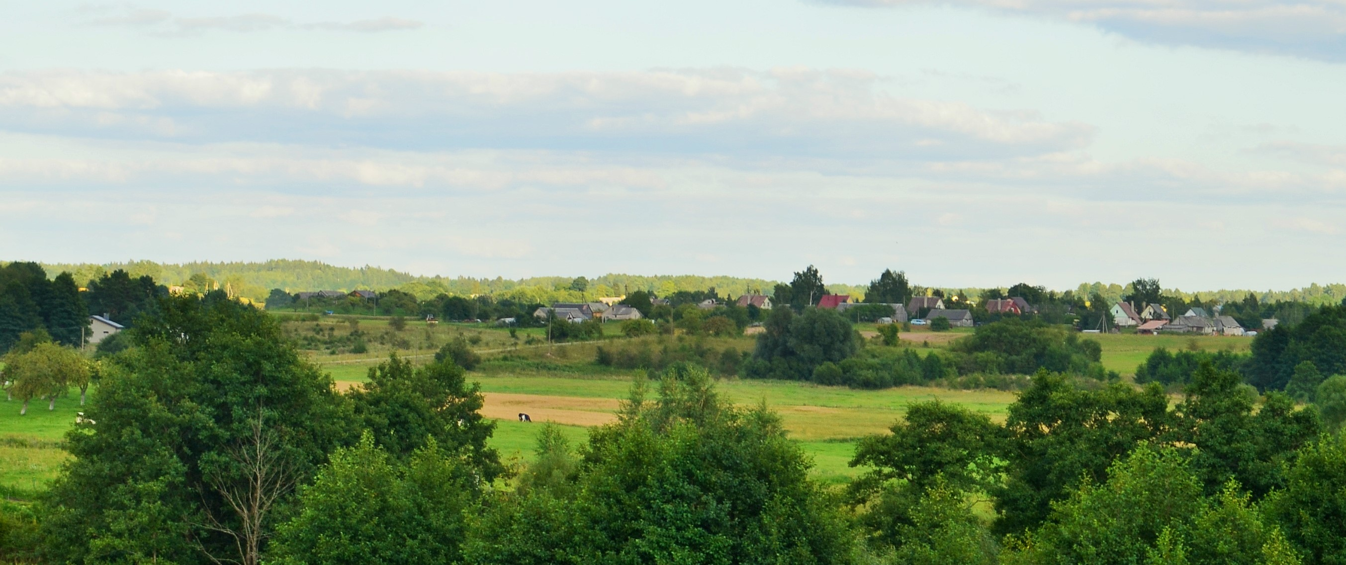 Alovė žvelgiant nuo Milžinų kalno, Alytaus raj.